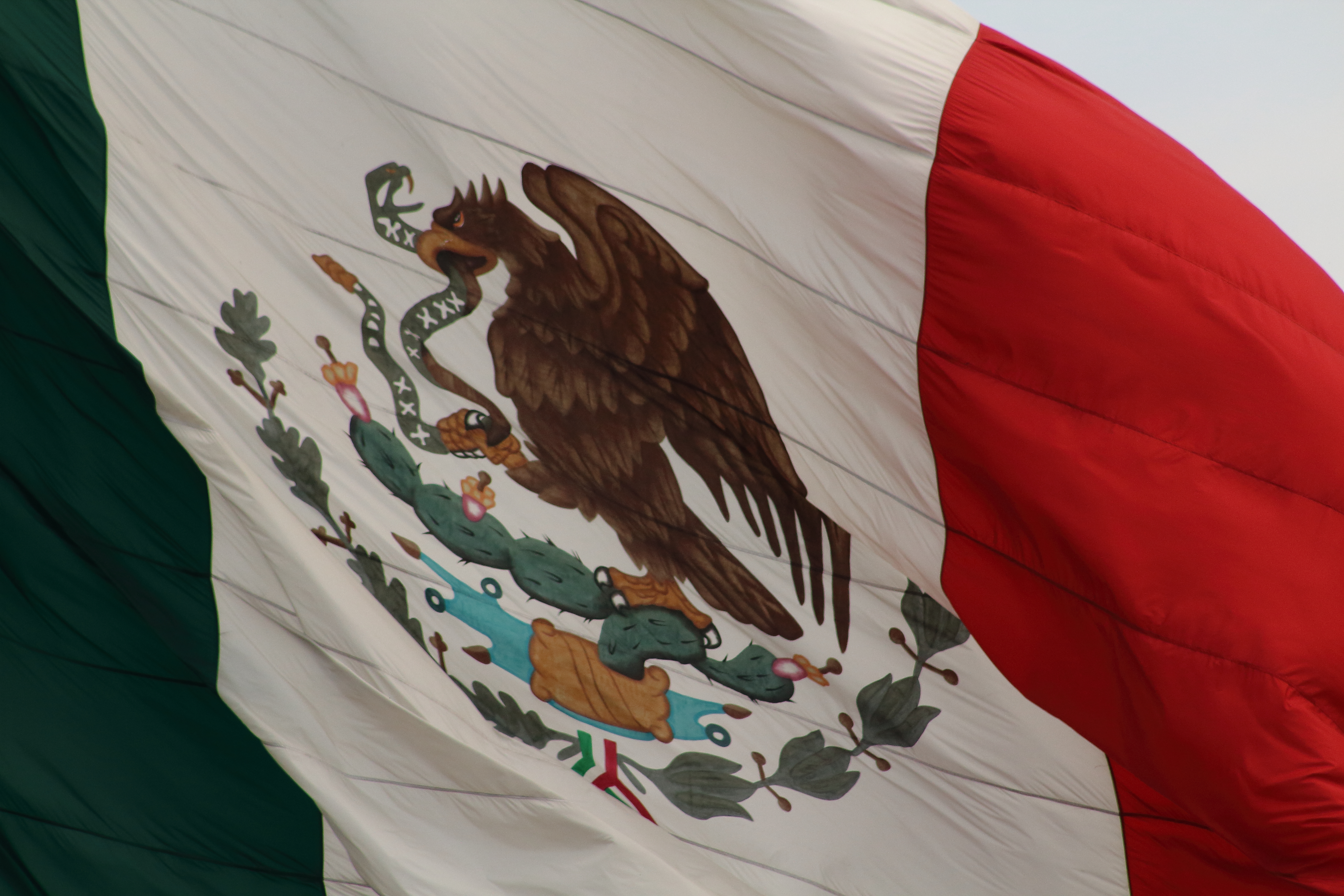 Bandera en la Plaza de Constitución (Ciudad de México )